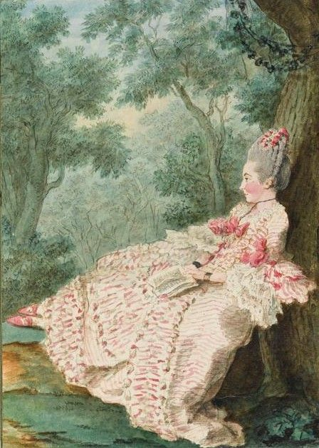 Louis Caroggis genannt Carmontelle (1717–1806): Angebliches Porträt von Félicité-Geneviève-Élisabeth marquise de La Croix geborener de Jarente de Senas (1718–1799 bzw. 1720–nach 1795), Gattin des spanischen Generalleutnants Maximilien-Joseph-Charles marquis de La Croix († 1768), Nichte des Bischofs von Orléans Louis-Sextius de Jarente de La Bruyère (1706–1778). Bleistift, Rötel, Aquarell, Gouache auf Papier. 28 x 20 cm. Musée Condé, Chantilly.